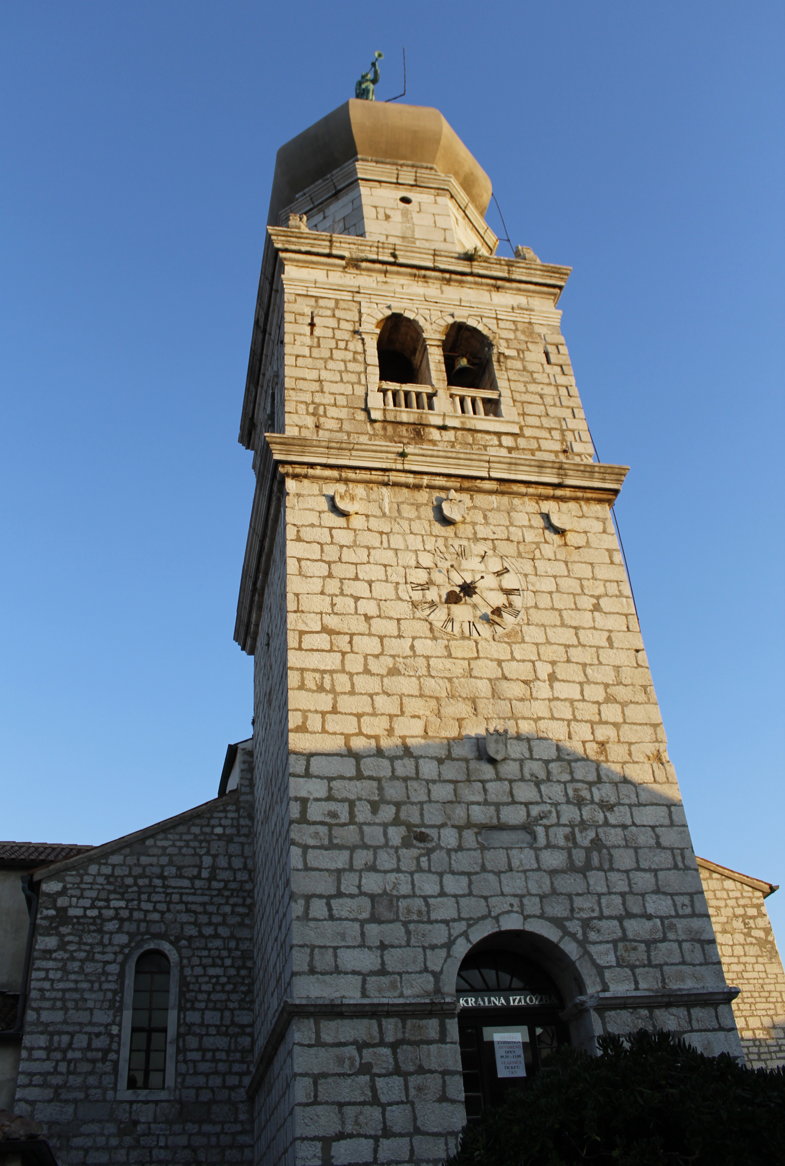 Szent Quirinus-bazilika, Krk, Horvátország